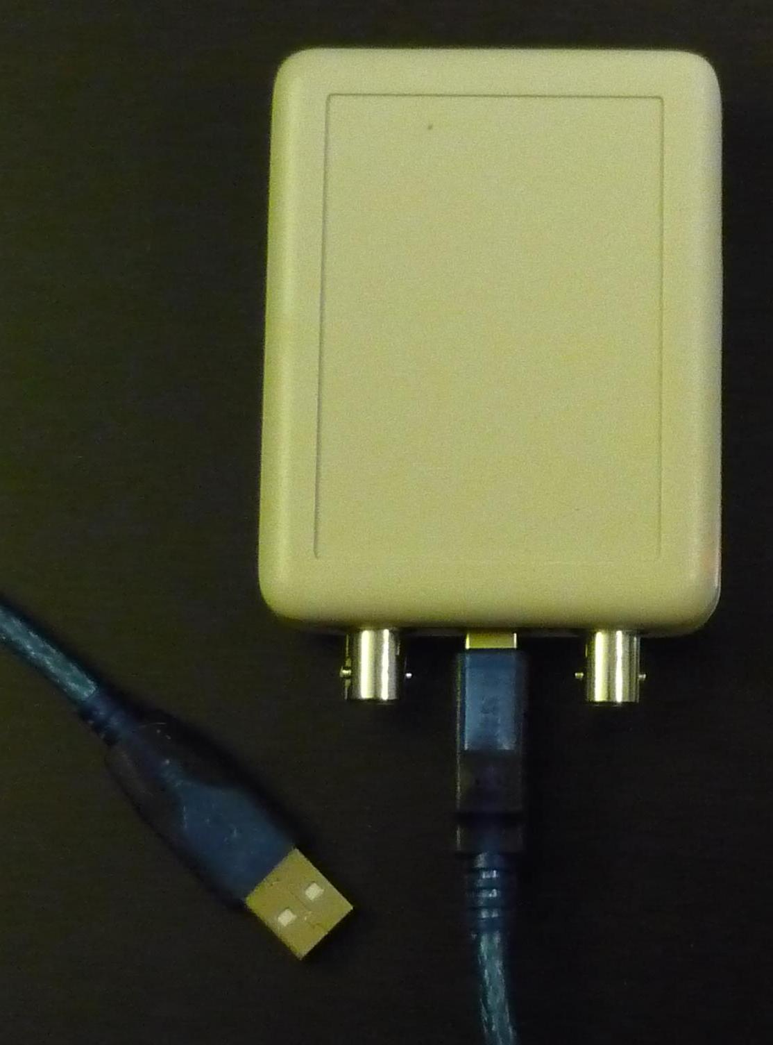 oscilloscope numérique USB pour ordinateur